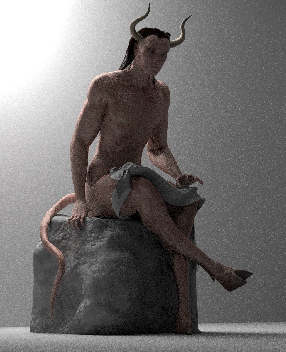 Вялес, бог старажытнага беларускага язычніцтва, апякун жывёлагадоўлі, палявання і багацця. 3D-мадэль, створаная ў рэдактары Blender